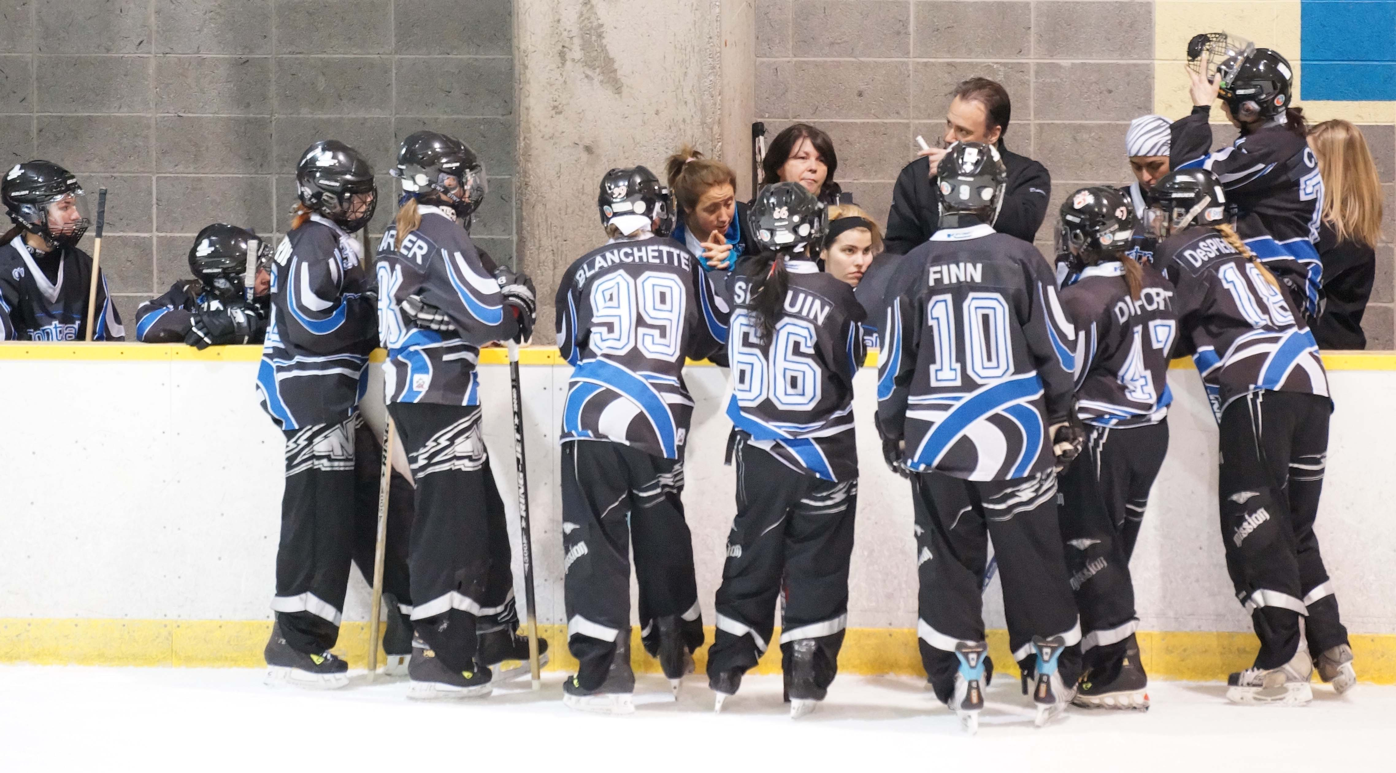 Ringuette